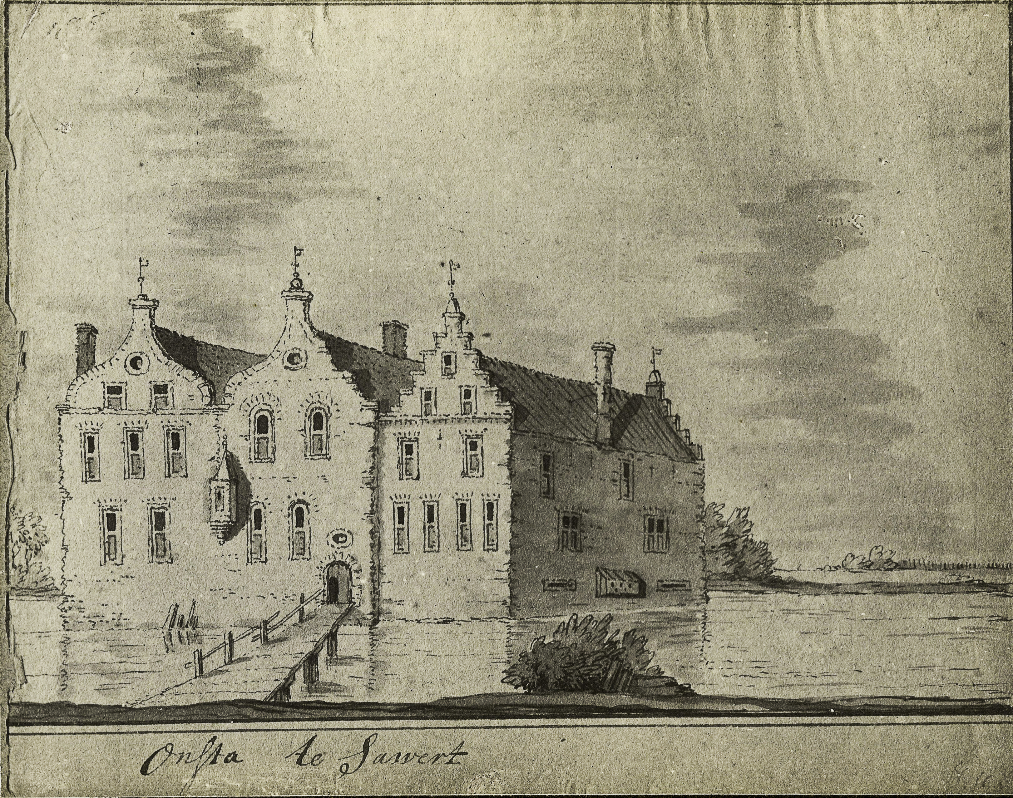 Afbeelding van de borg te Sauwerd door Jacobus Stellingwerff.